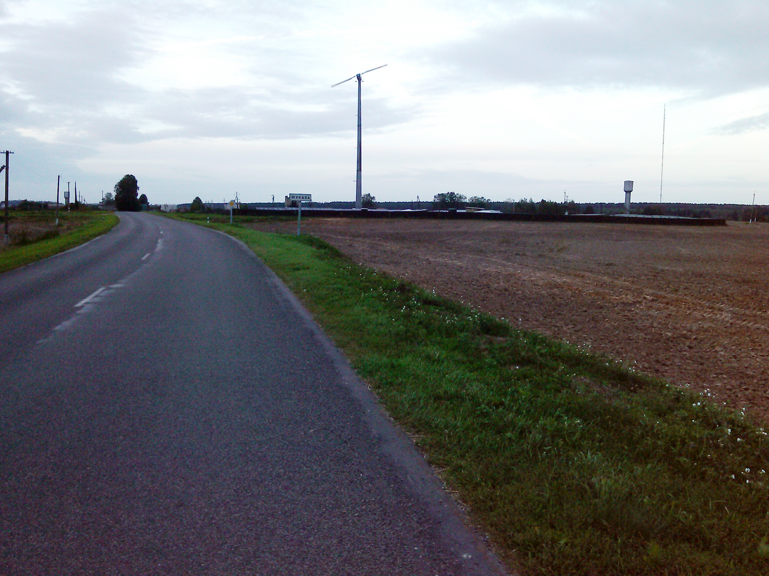 Ветряк на въезде в Жуково